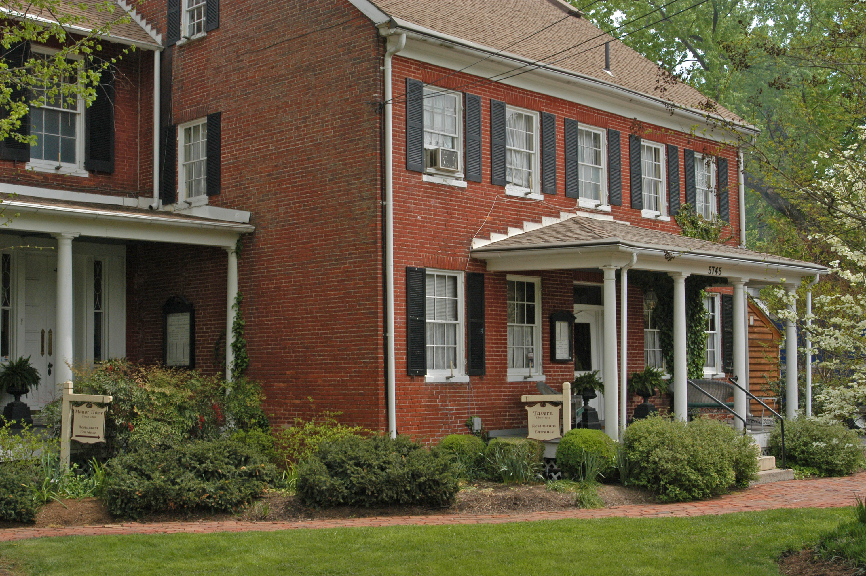 Elkridge Furnace Inn on Furnace Avenue in Elkridge, MD.